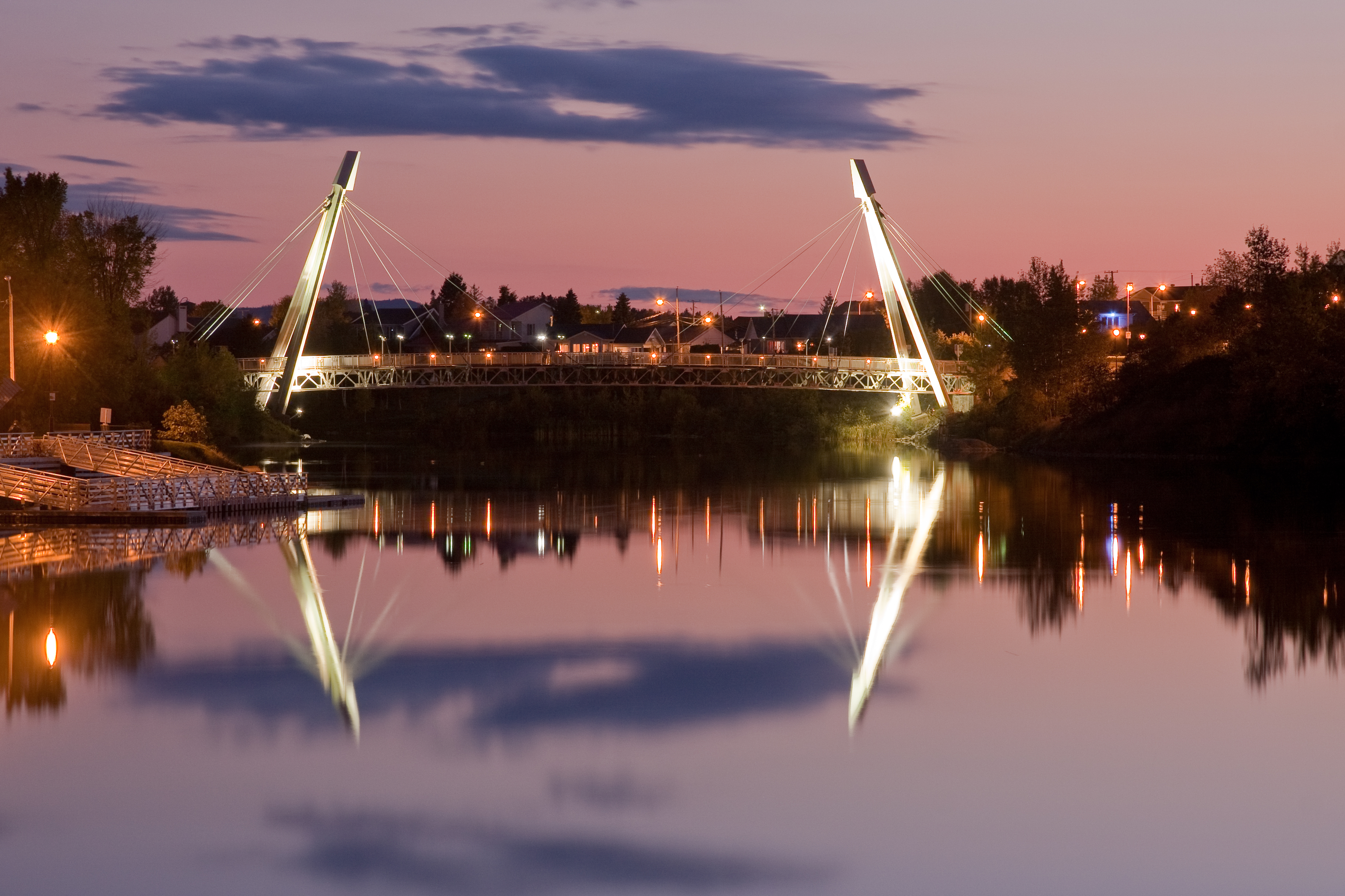 Passerelle piétonnière d'aluminium sur la Rivière aux Sables